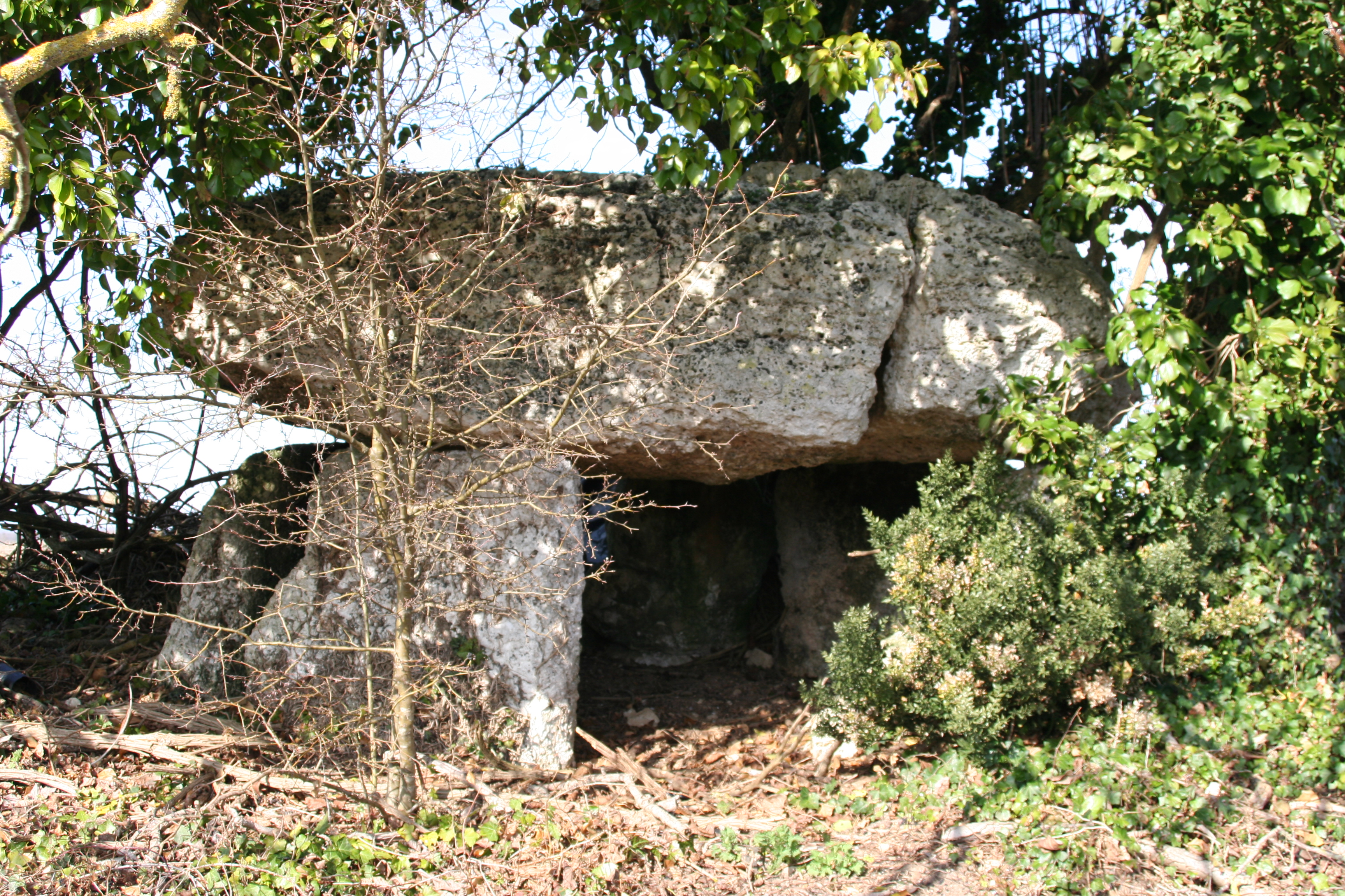 Malgré un classement aux "monuments historiques" le 4 Août 1927, le dolmen semble bien abandonné.